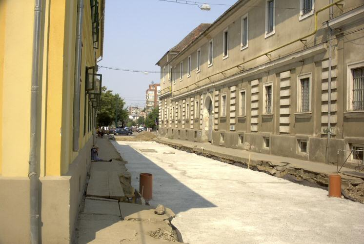 Straßenbahn Timisoara, Gleisrekonstruktion